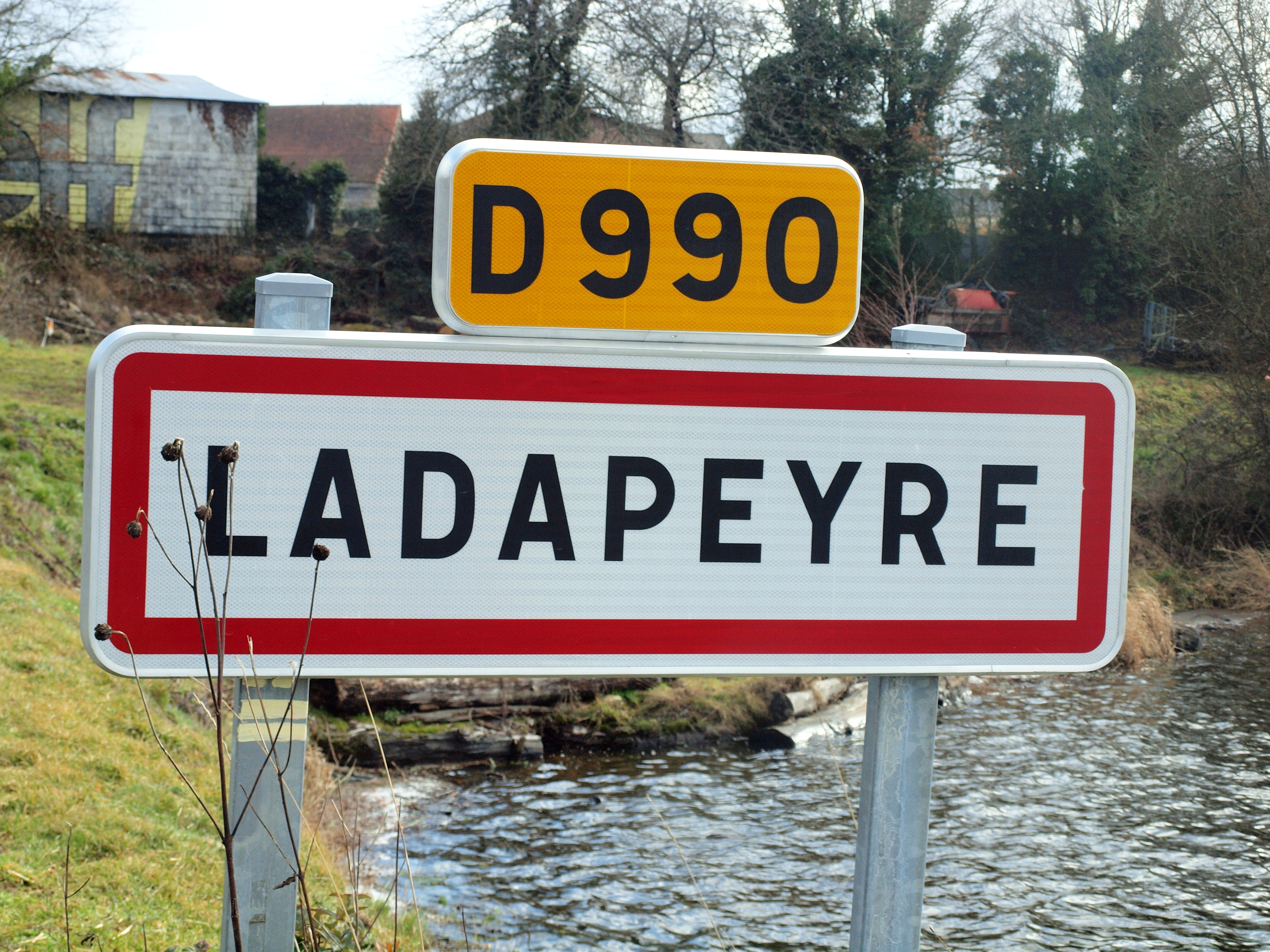 Ladapeyre (Creuse, France)